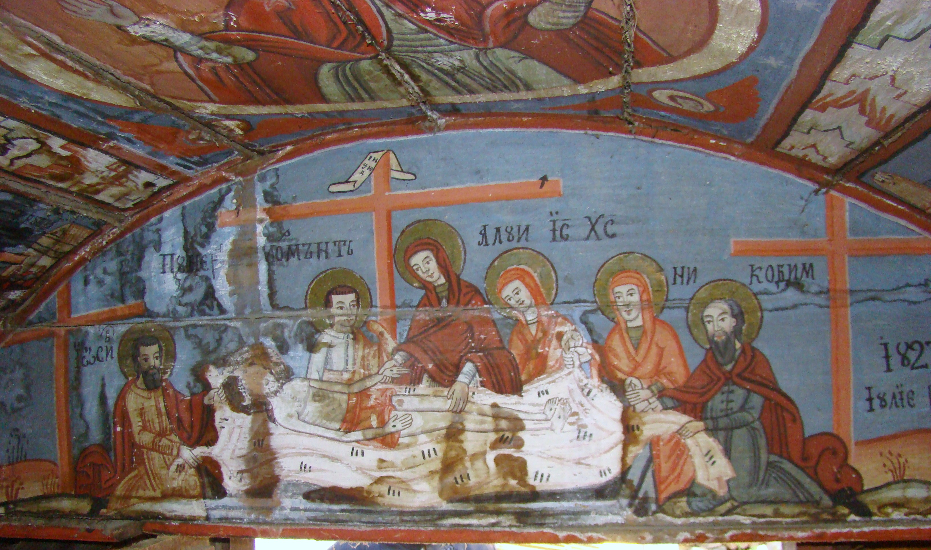 Edicul „Osuar” cu pictură pe pânză